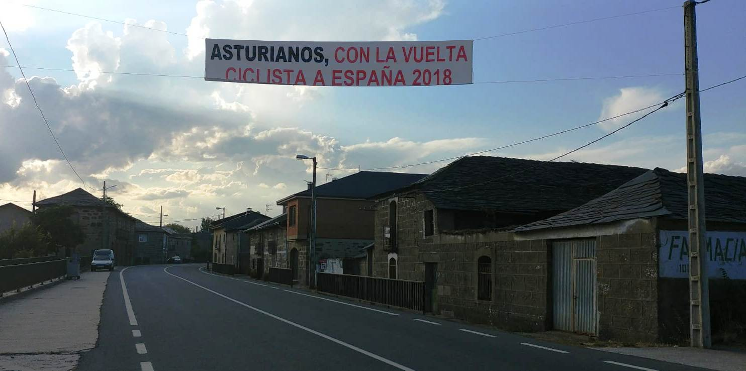 Vista general de Asturianos antes del paso de la Vuelta Ciclista España 2018.